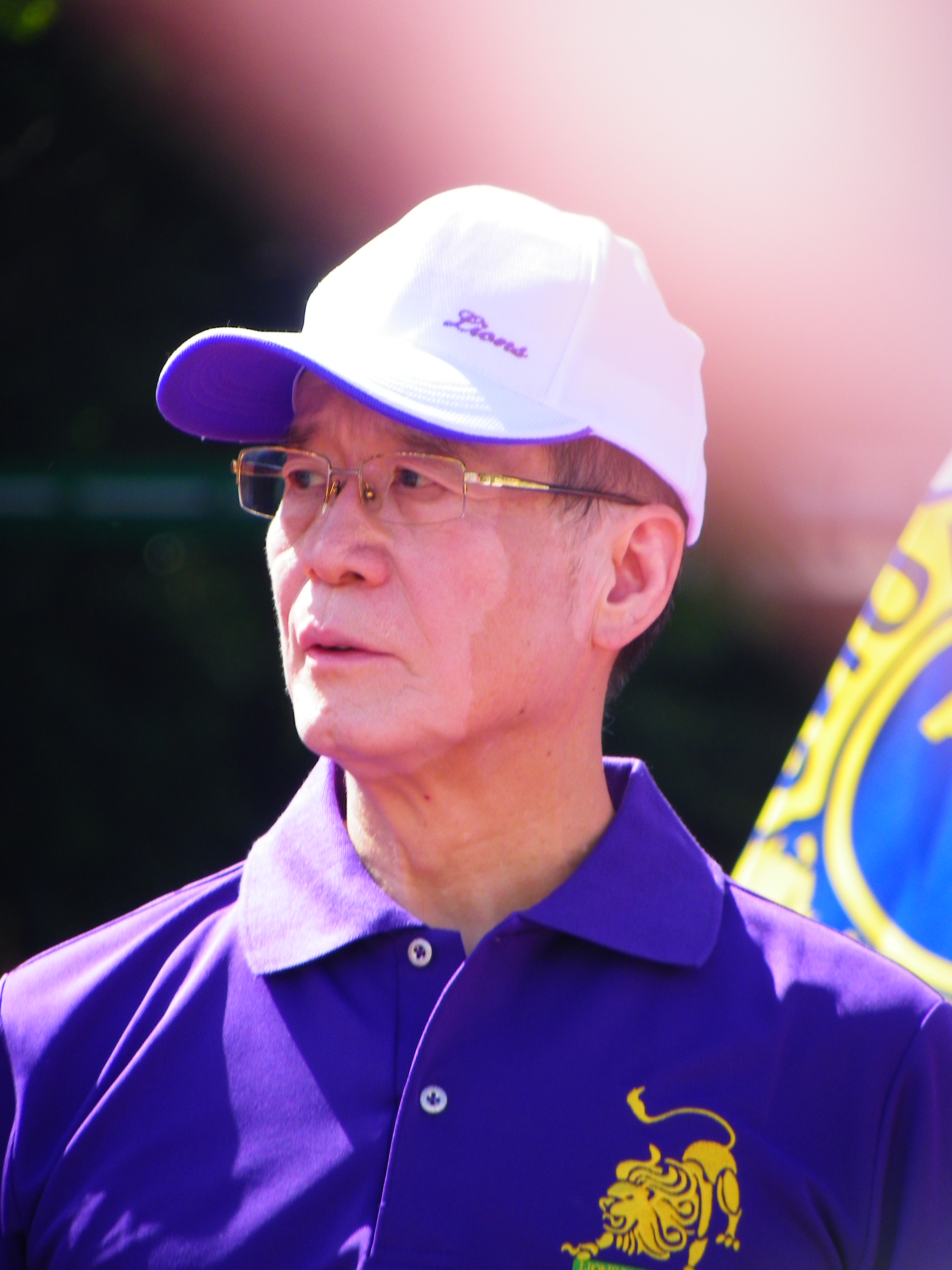 出席國際獅子會300A2區2013年環保愛地球重建倫理道德健行大會的台灣永續能源研究基金會董事長簡又新。